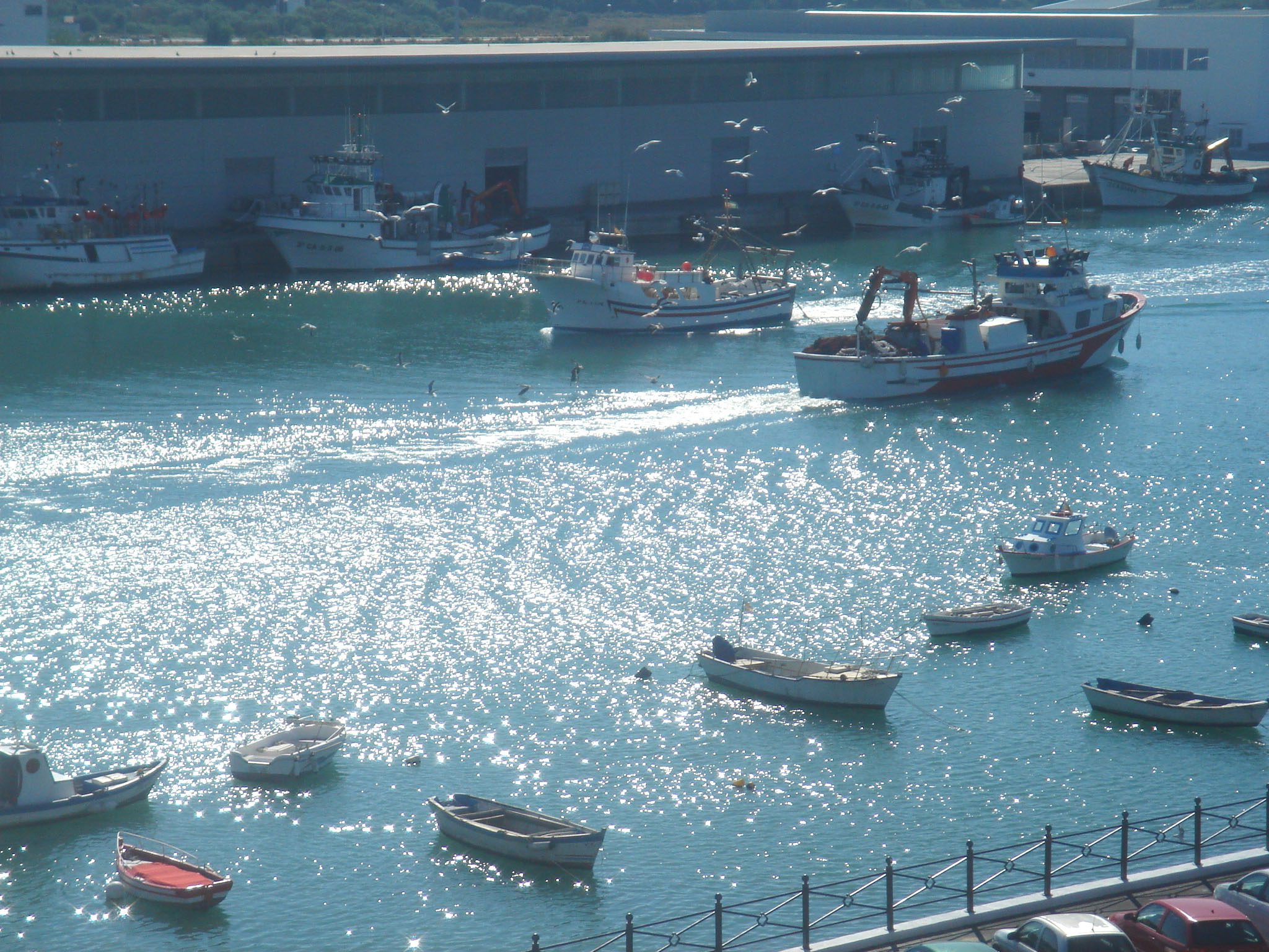 Barcos de pesca en maniobra, por el Río Guadalete, para descargar. Los nombres no lo se porque son barcos de Barbate que se dedican a la pesca de cerco, o sea para pescar sardinas y boquerones, estos barcos salen a pescar por la tarde noche y regresan por la mañana, como observaran todas las gaviotas de alrededor es porque estan tirando al mar los pescados rotos y los no comerciales y están para darse el banquete. Foto tomada desde la piscina del Hotel Santa María